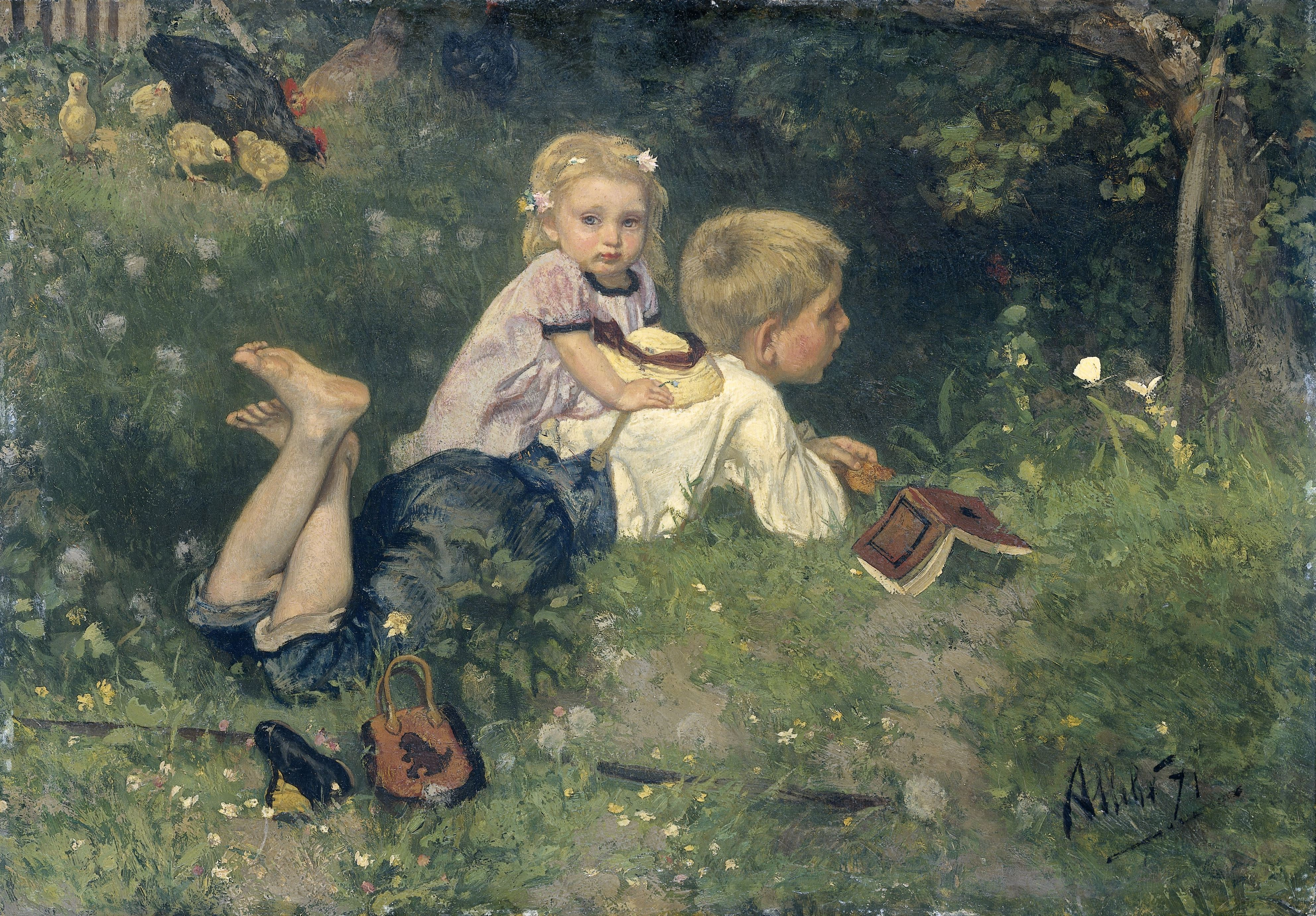 Voorstelling getiteld 'De Vlinders'. Twee kinderen liggen in het gras en kijken naar vlinders. Linksachter een kip met kuikens.